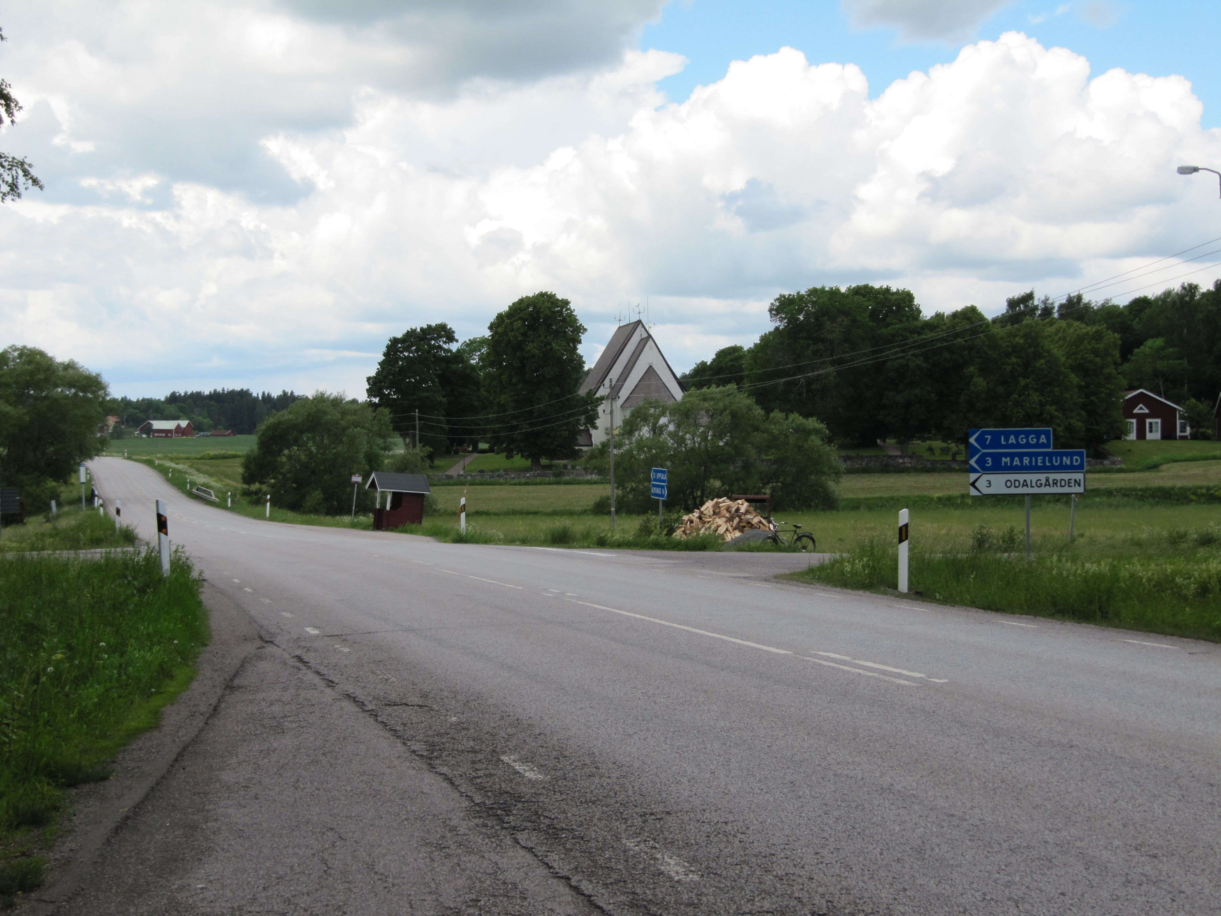 Länsväg 282 vid Funbo